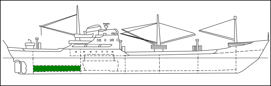 Ubicación del túnel del eje porta hélice. Propeller shaft tunnel